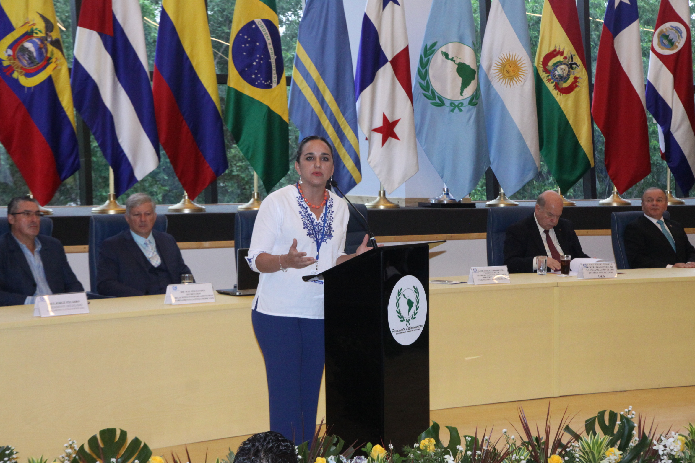 Fotografía: Hugo Ortiz / Asamblea Nacional Tema: La presidenta de la Legislatura, Gabriela Rivadeneira, en la Asamblea Conmemorativa del 50 aniversario del Parlamento Latinoamericano Boletín de prensa